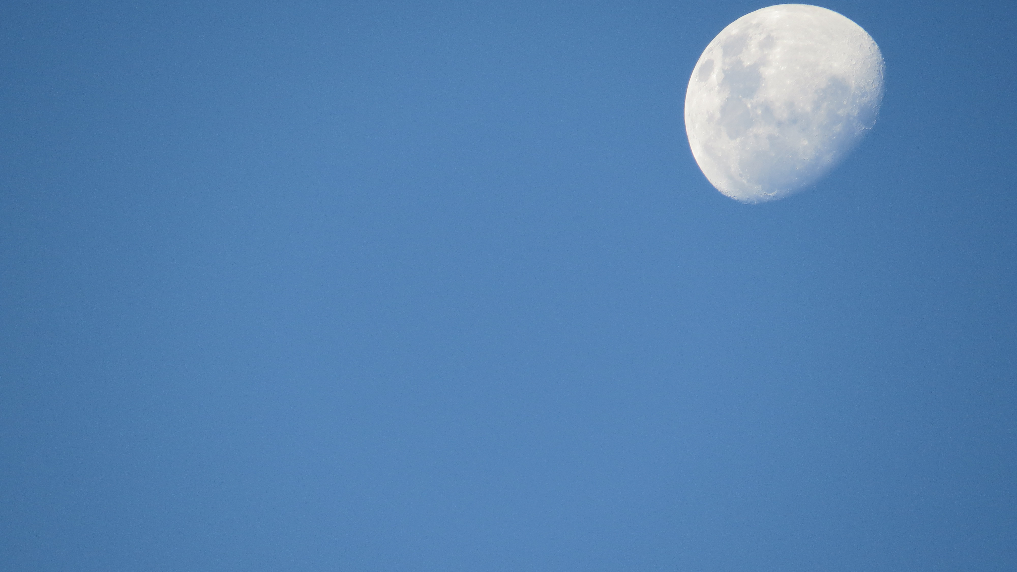 Riacho Fundo I, Brasília - DF, Brazil